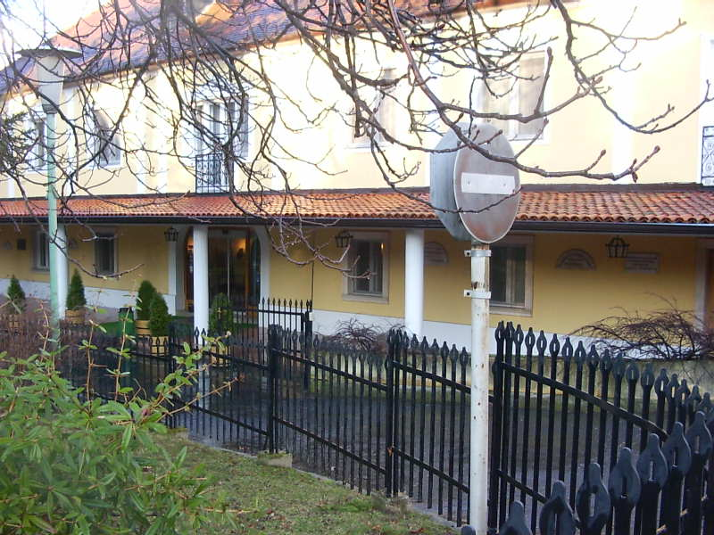 Az Állami Szanatórium fizetős részlege (Balf, Sopron)